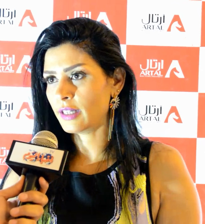 المغنية ساندي في 2016